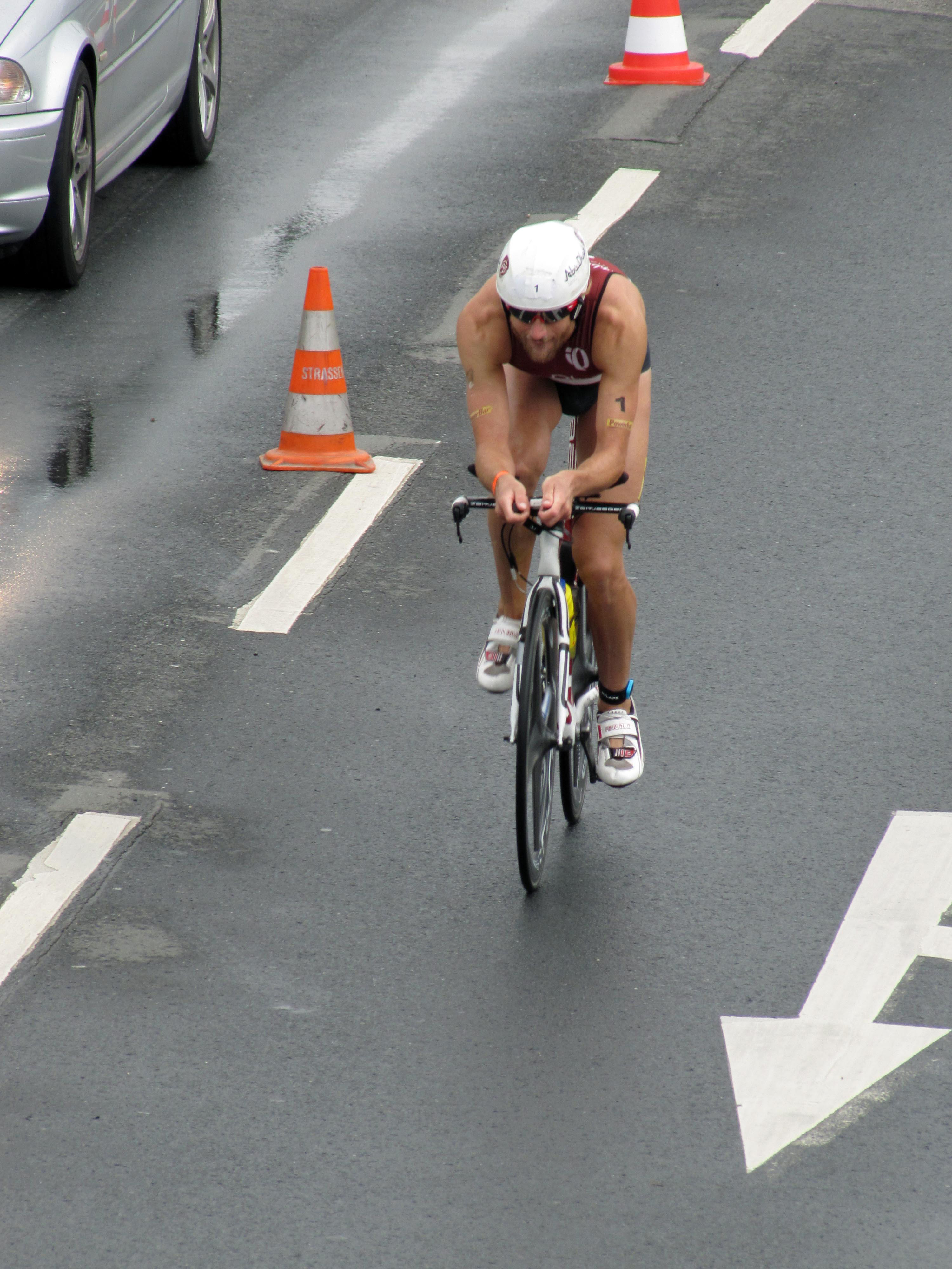 Faris Al-Sultan, 2011 beim Ironman Germany in Ffm. Unknown